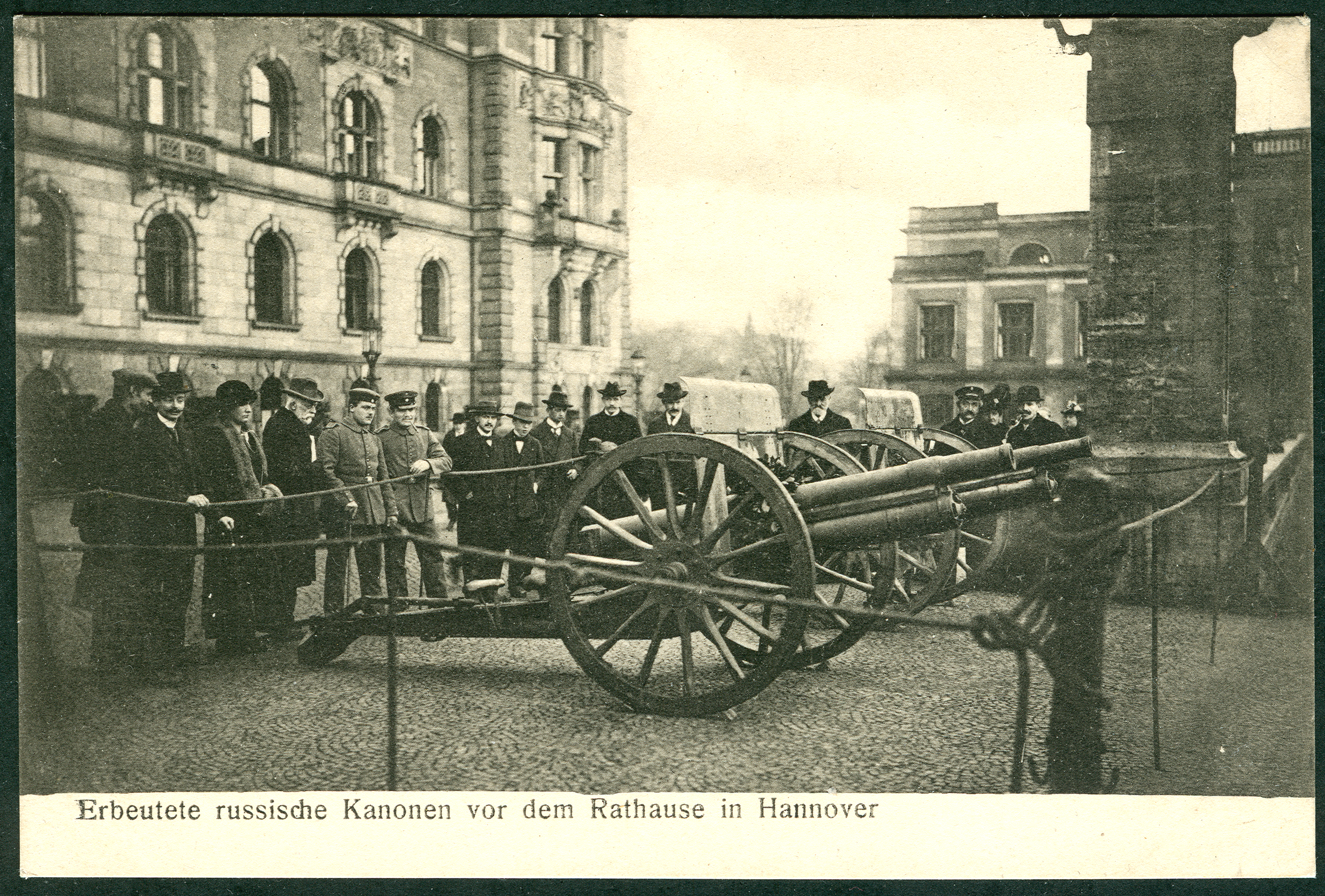 Ansichtskarte Nummer 938 der Norddeutschen Papier-Industrie mit dem Titel "Erbeutete russische Kanonen vor dem [Neuen] Rathause von Hannover"; im Hintergrund das noch lange unzerstörte Kestner-Museum ...